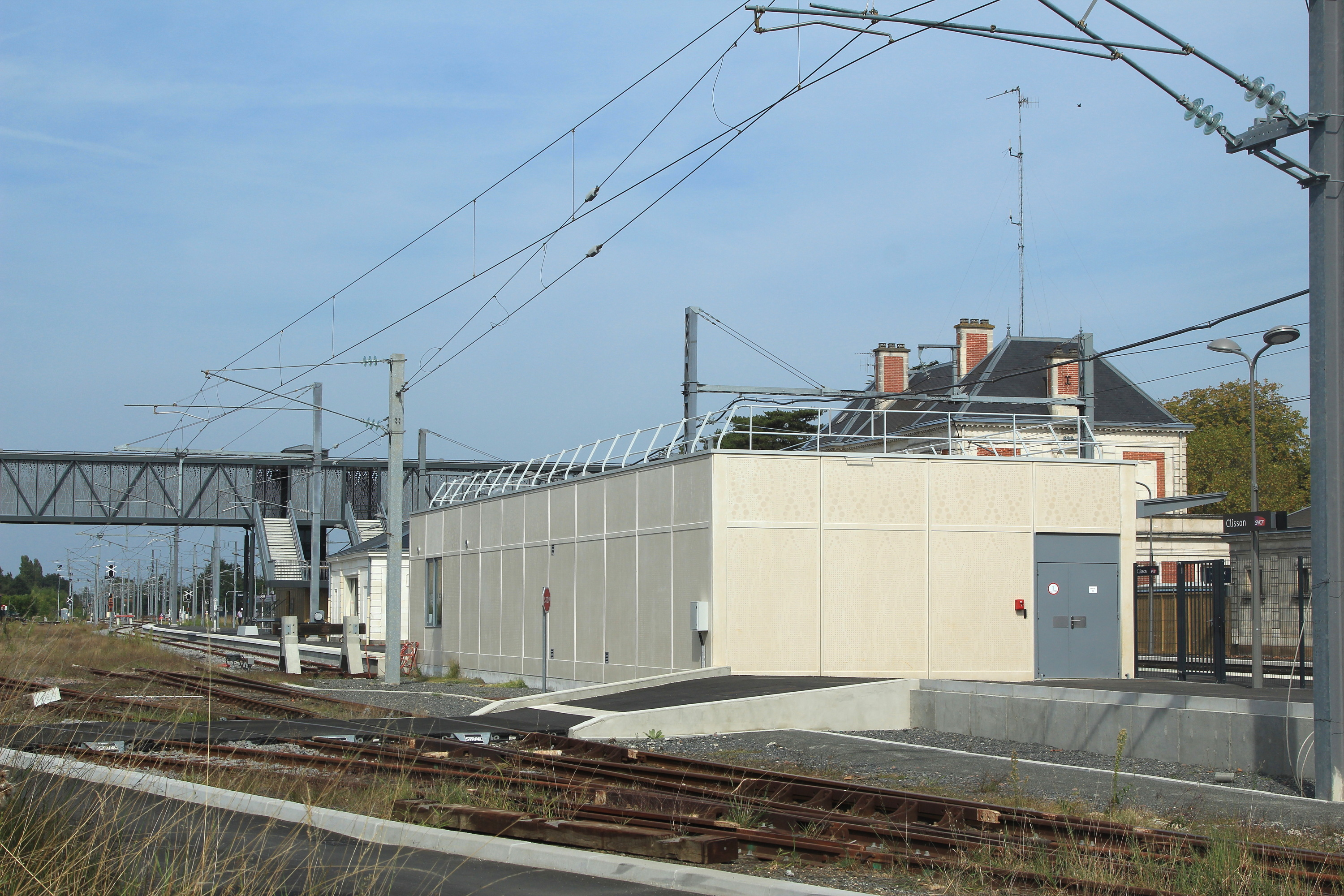 Nouveau bâtiment créé sur les voies à Clisson pour la régulation du tram-train Nantes - Clisson.